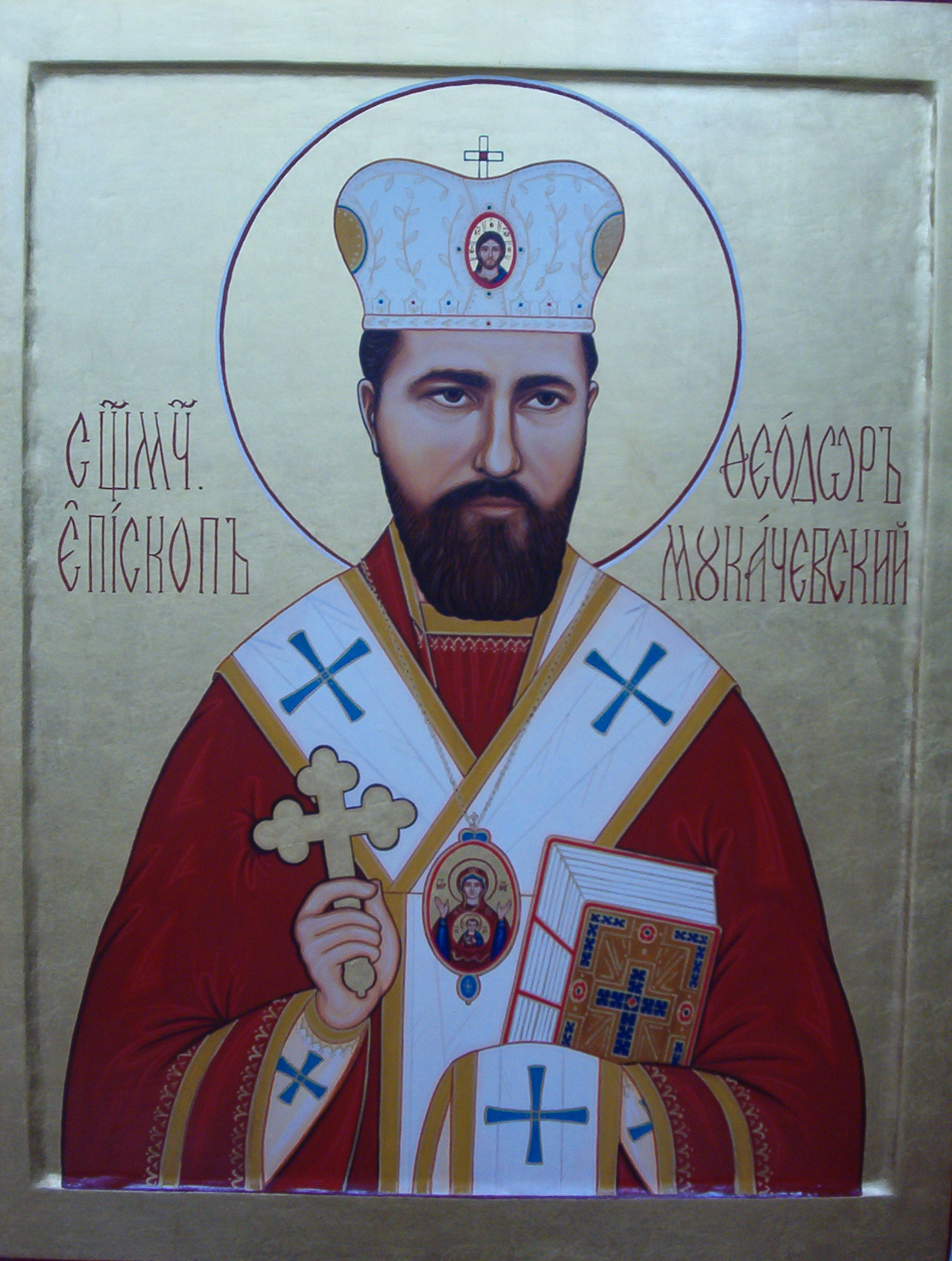 Икона Теодора Ромжи, храм св. Антония при Руссикуме